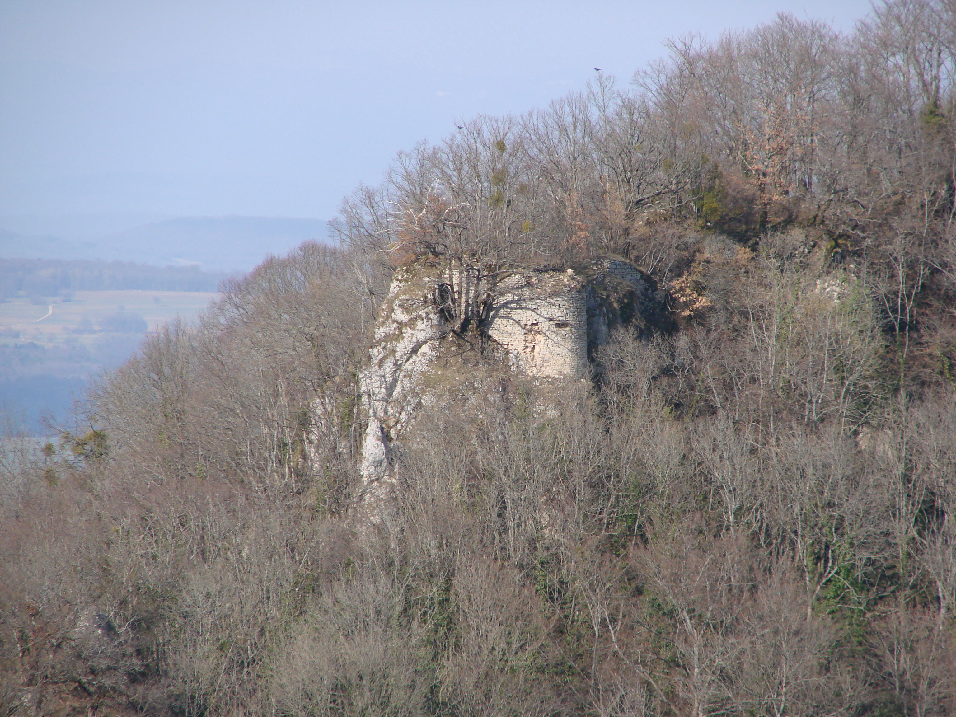 Vue des ruines du château de Bermont.